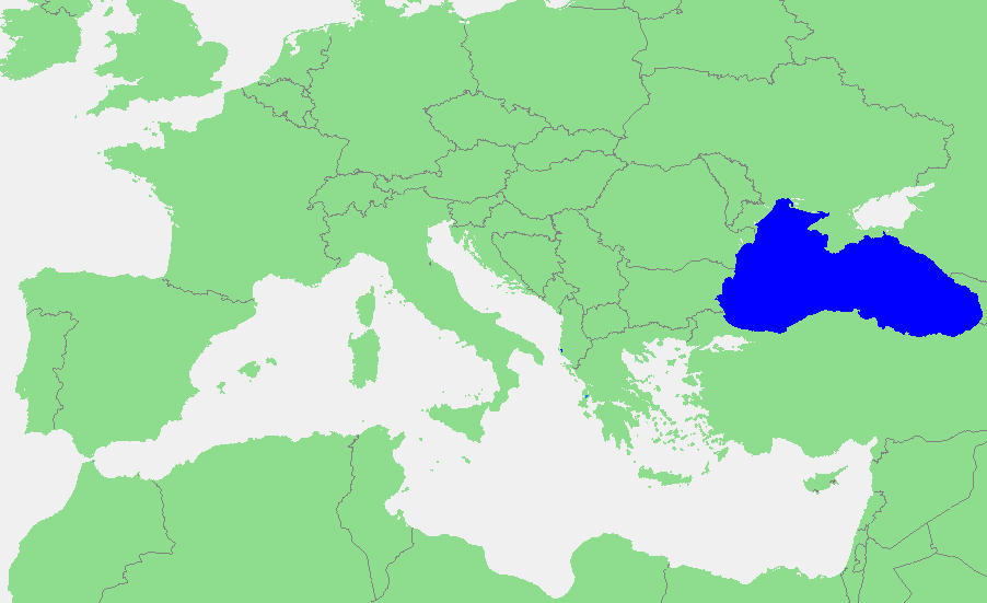 In dutch: Locatie Zwarte Zee.PNG